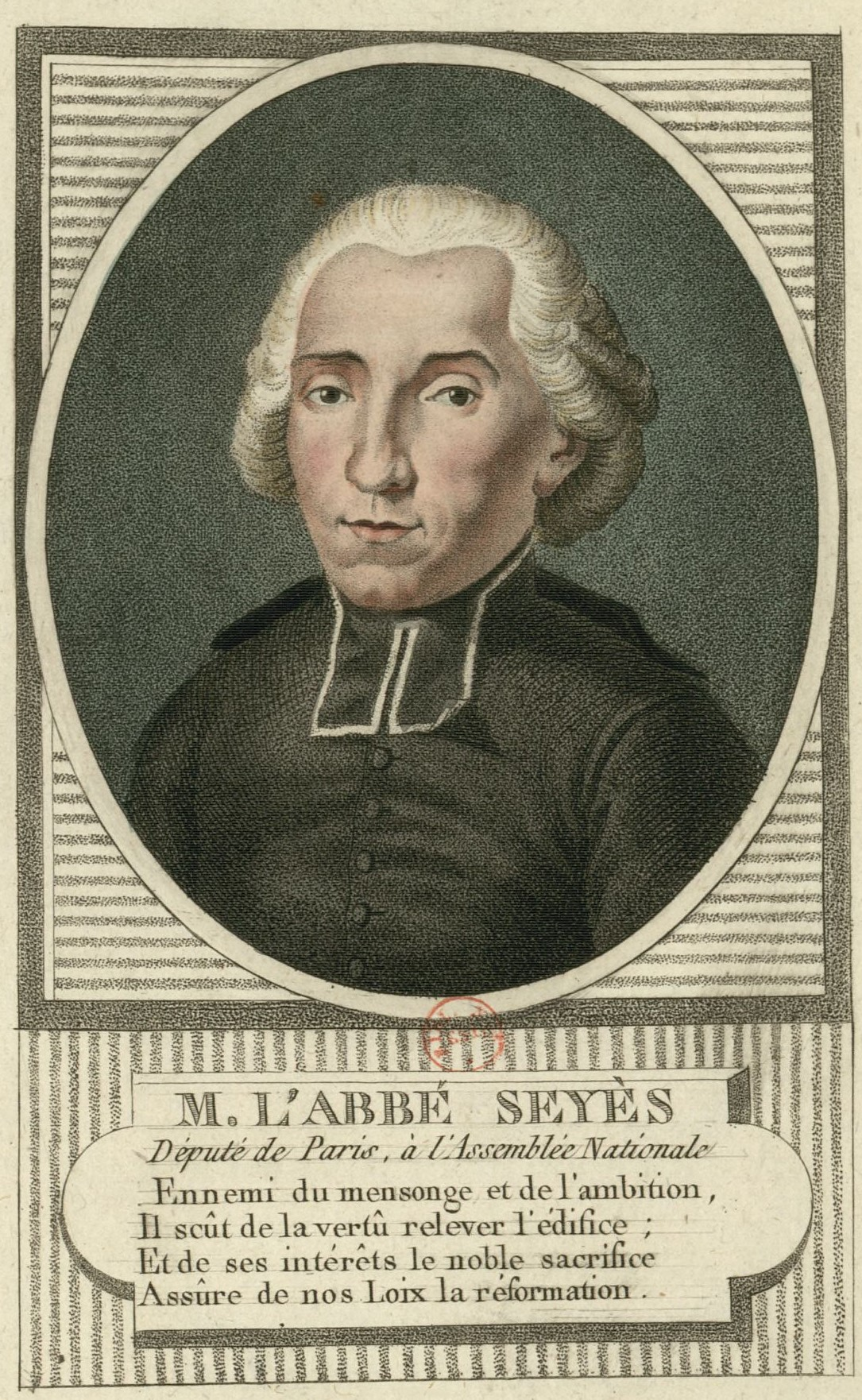 M. L'abbé Seyès : député de Paris à l'Assemblée nationale (estampe)